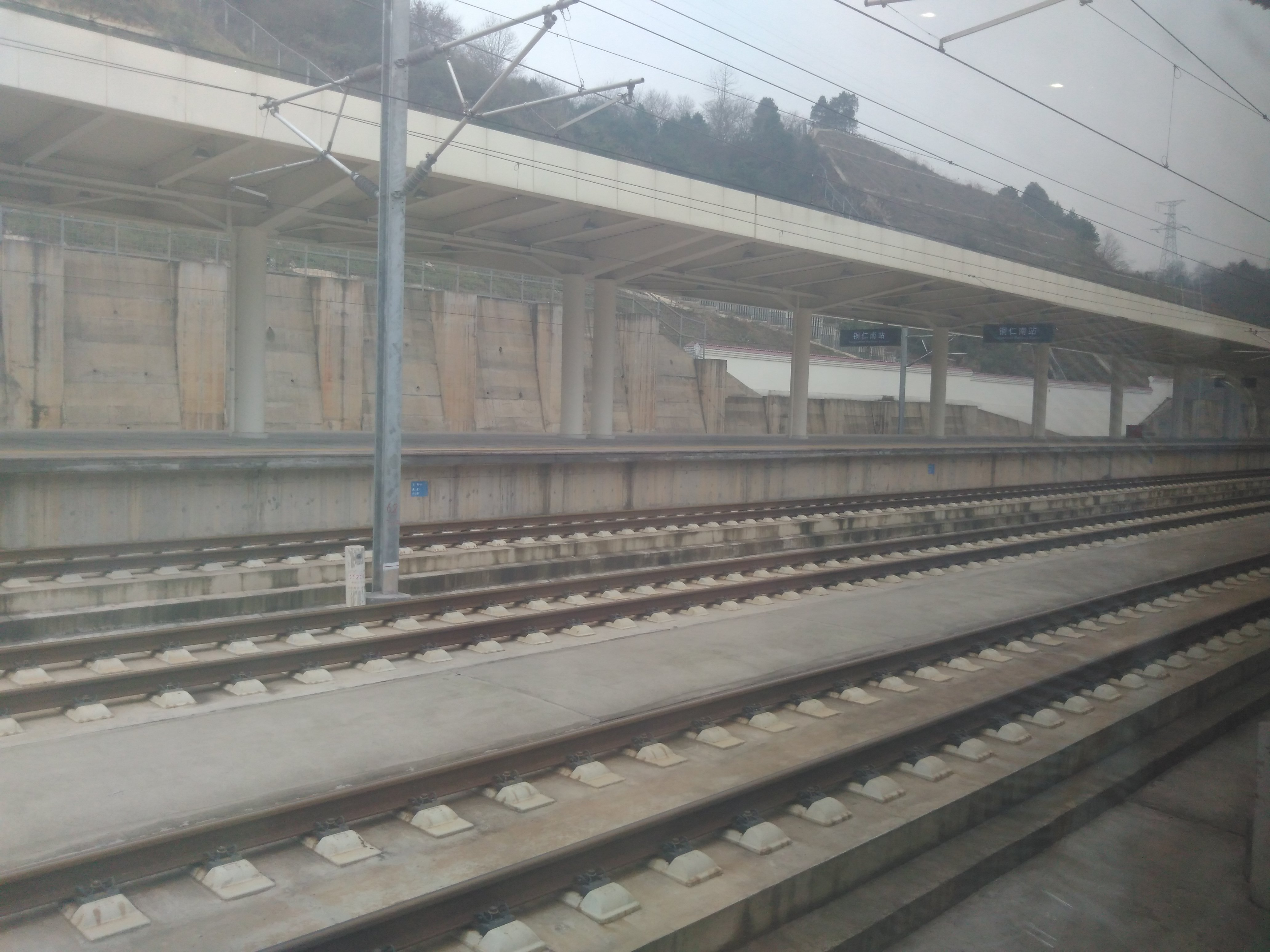 中文（中国大陆）: 沪昆高铁铜仁南站